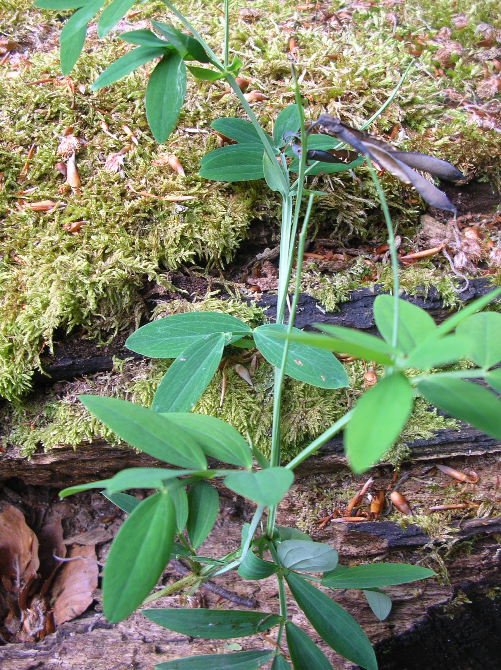 Gesse des montagnes (Moselle 57)